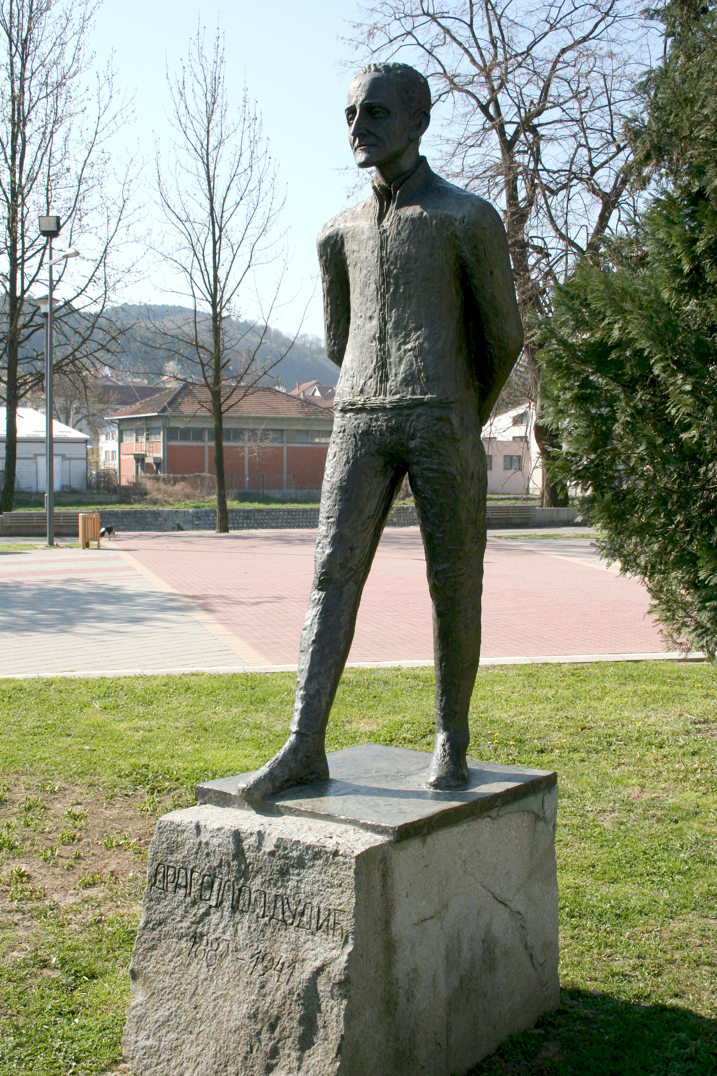 Spomenici, Valjevo